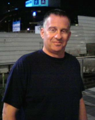 Imanuel Rosen